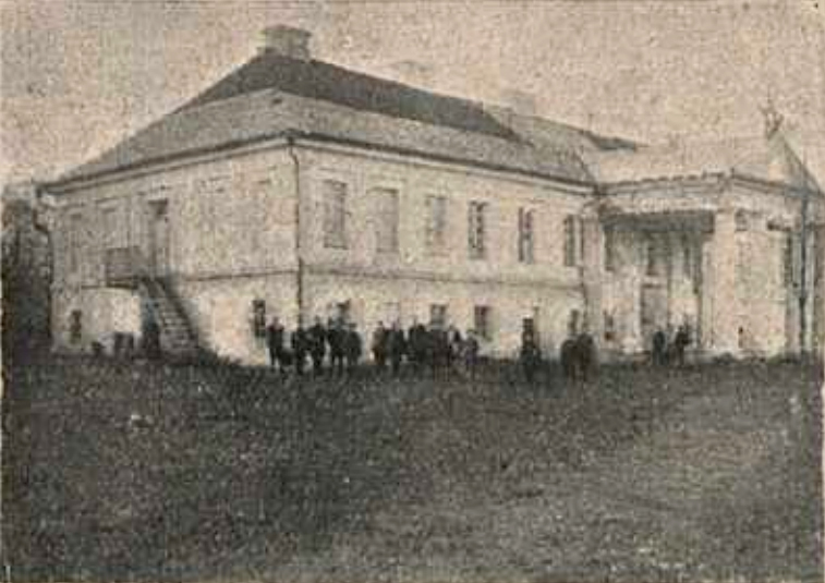 Беларуская (тарашкевіца): Шацак (Šacak), палац Аскеркаў (Askierka)